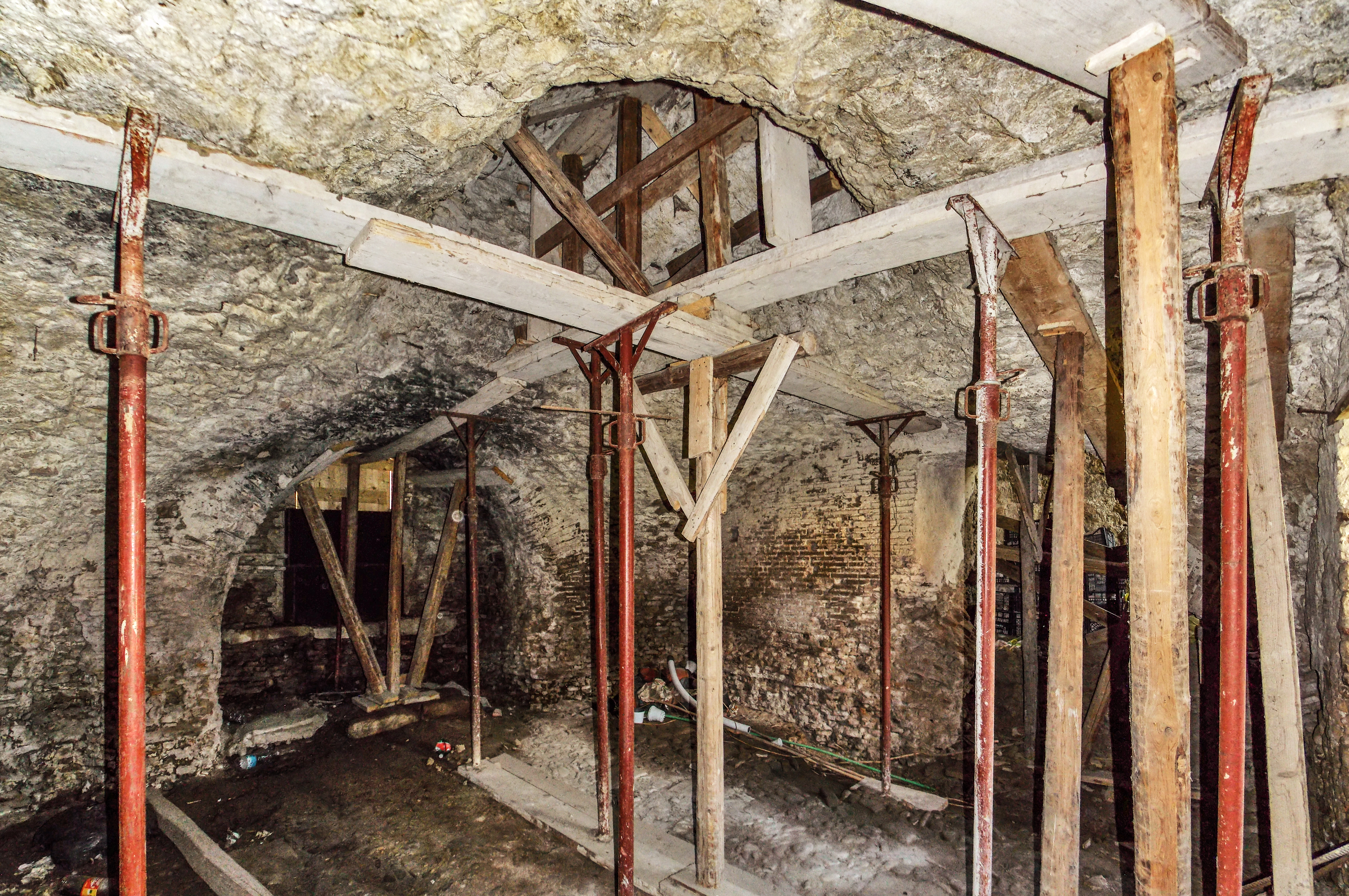 Ambiente a volta al pianoterra di casa Campi a Benevento, pertinente ad un edificio termale di età romana